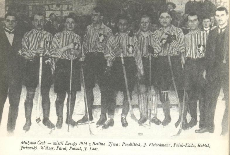 Чемпион Европы по хоккею с шайбой 1994 года — сборная Богемии